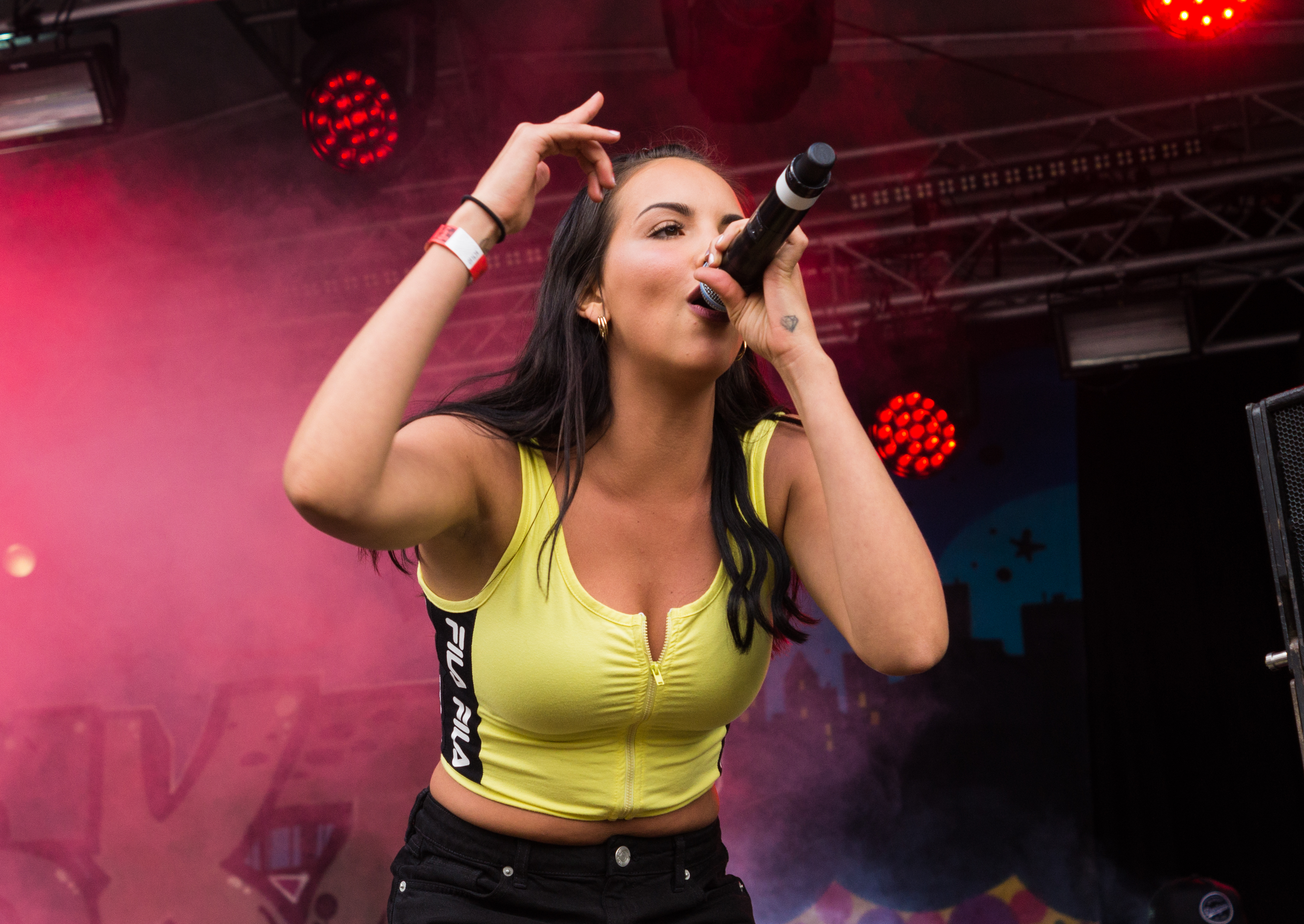 Die Rapperin SXTN auf dem Kosmonaut Festival 2017 in Chemnitz